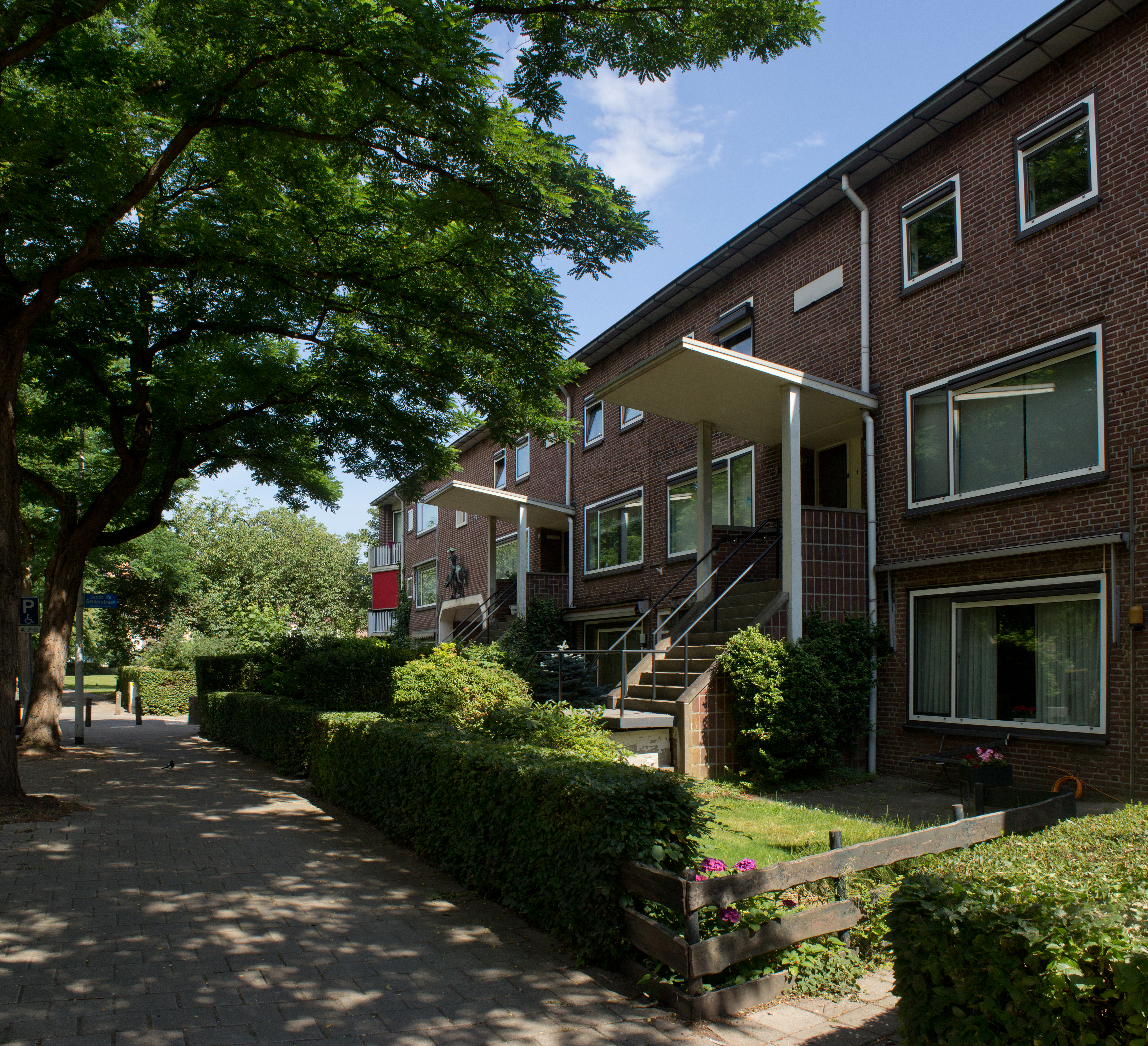 Triplexwoningen in de EIndhovense wijk Limbeek. Let op het wisselende metselwerk op de trappen naar de portieken.